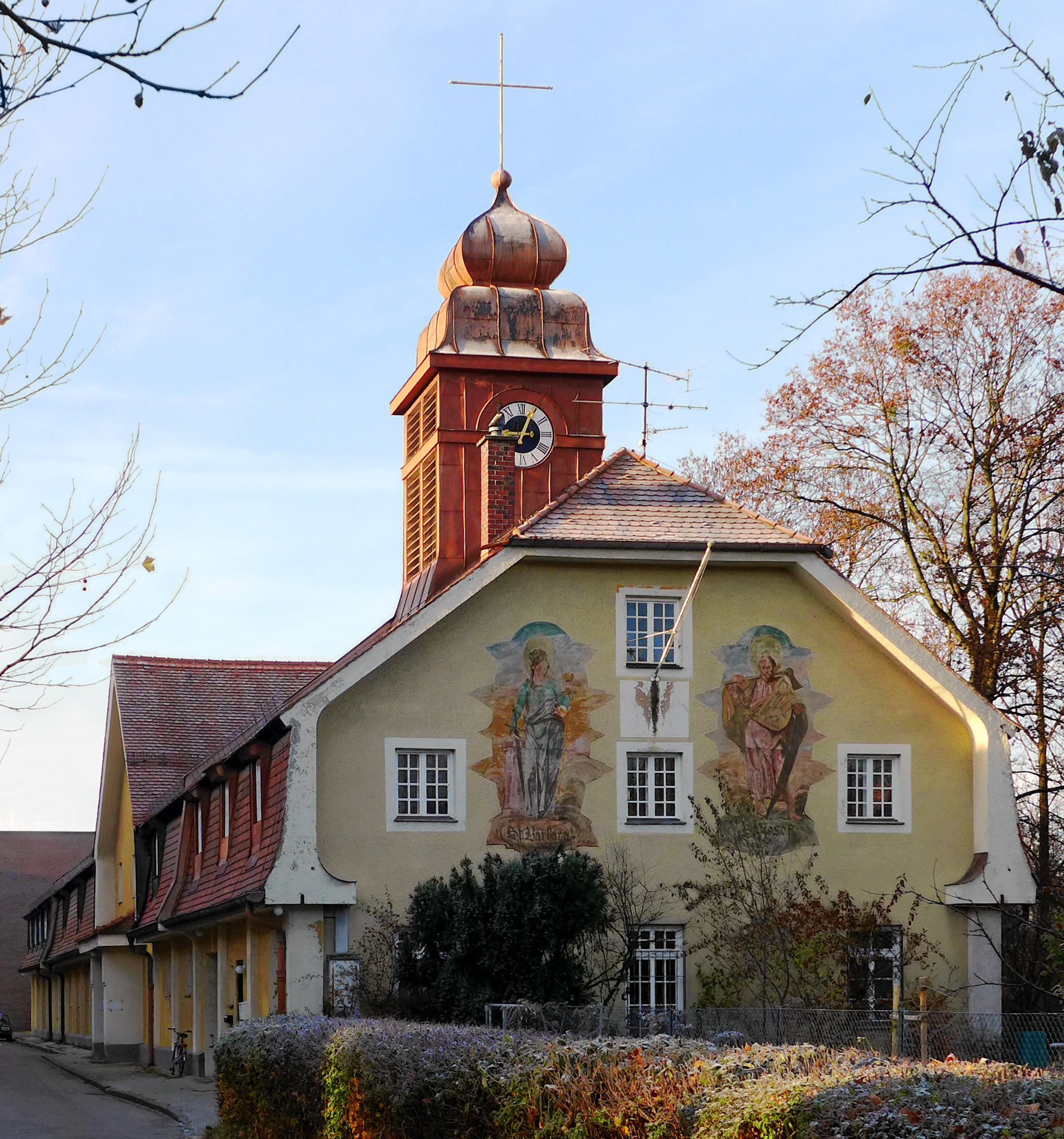 Kirche St. Barbara, Infanteriestr. 15, München